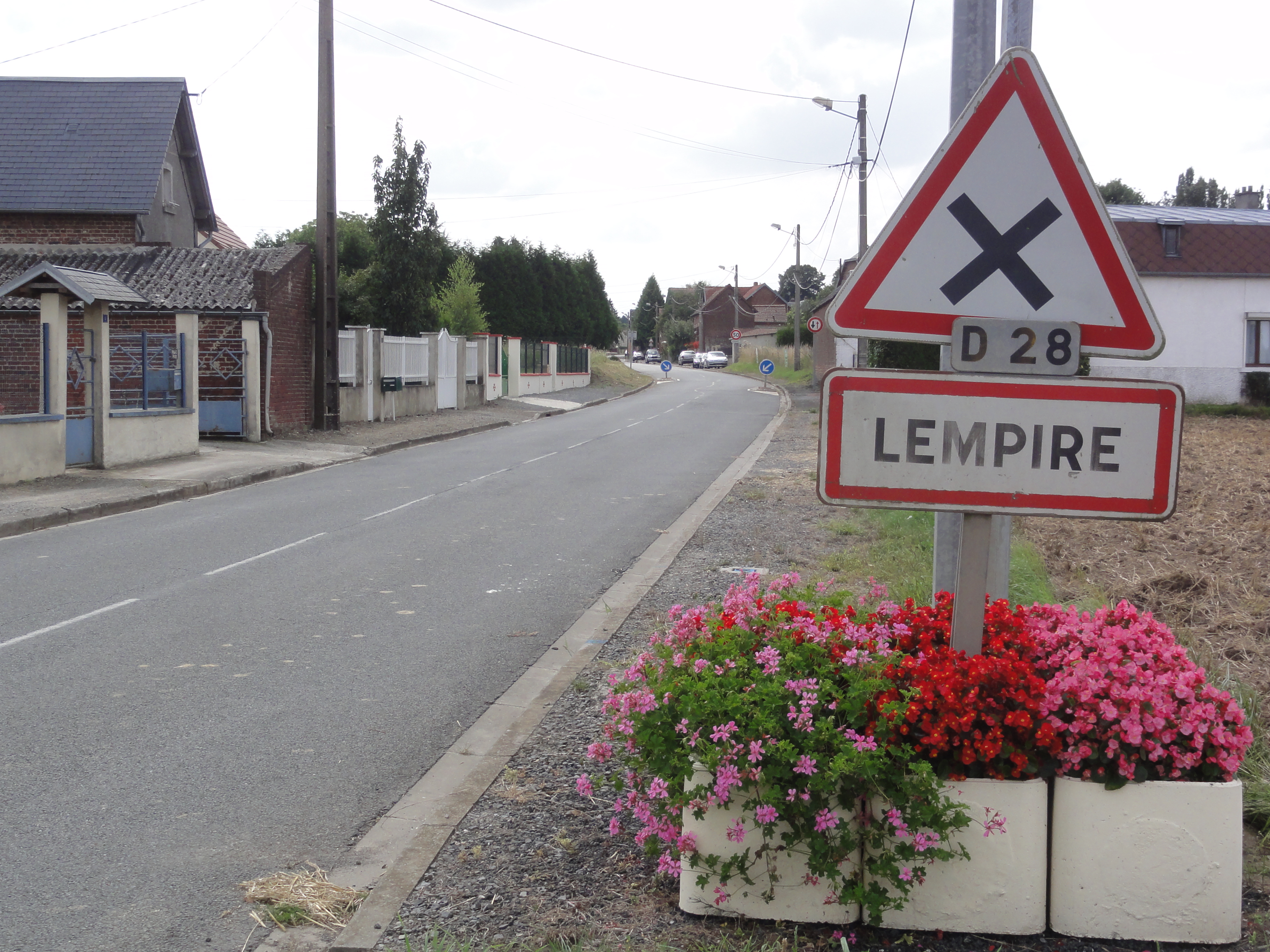 Lempire (Aisne) city limit sign